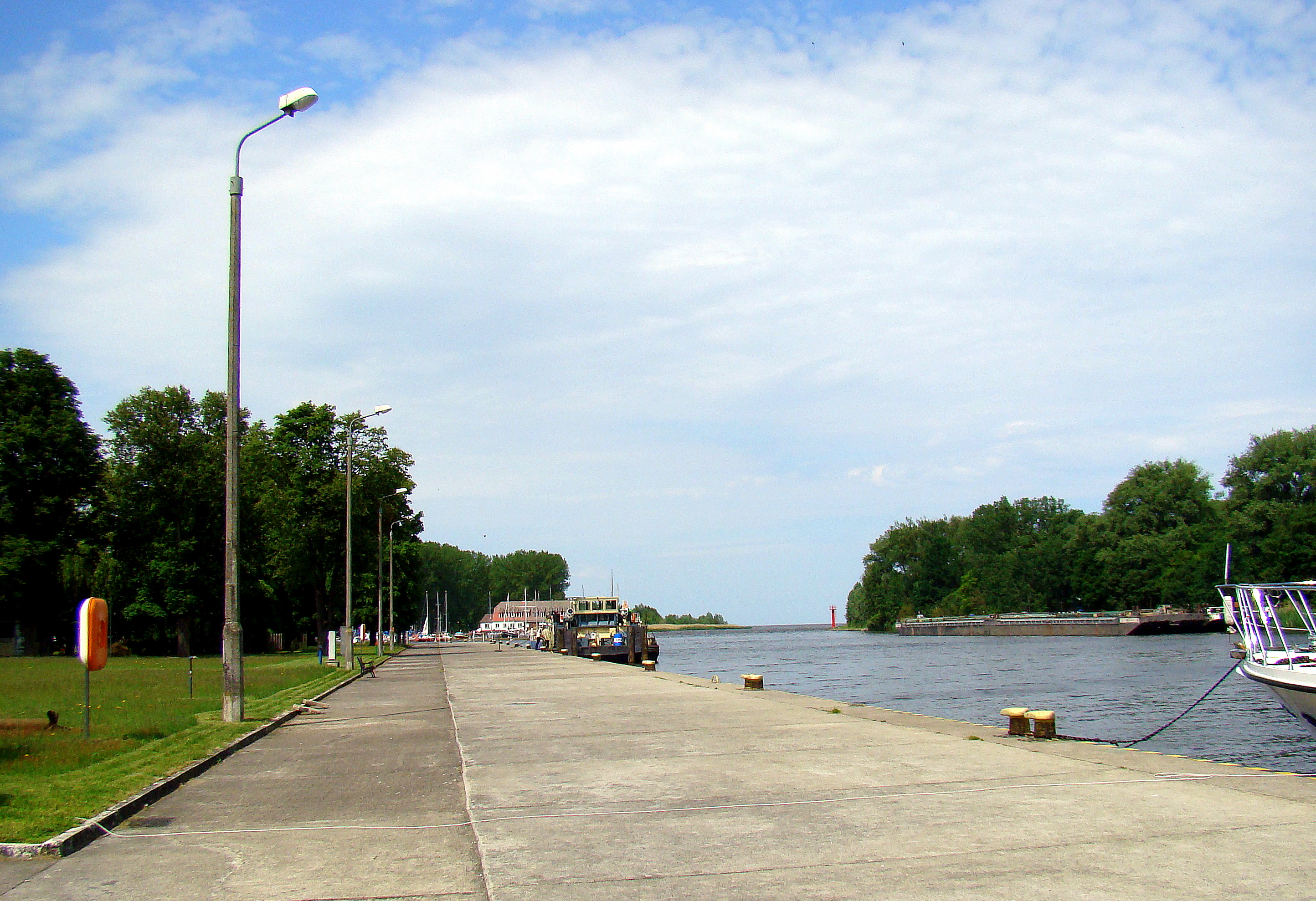 Port Trzebież (nabrzeże tranzytowe), Województwo zachodniopomorskie, Polska